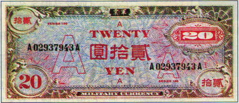 朝鮮半島南部及び日本の一部で使用されたアメリカ軍のA円軍票「二十円」の表側デザイン